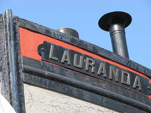 Bildo el la antverpena ŝipmuzeo.